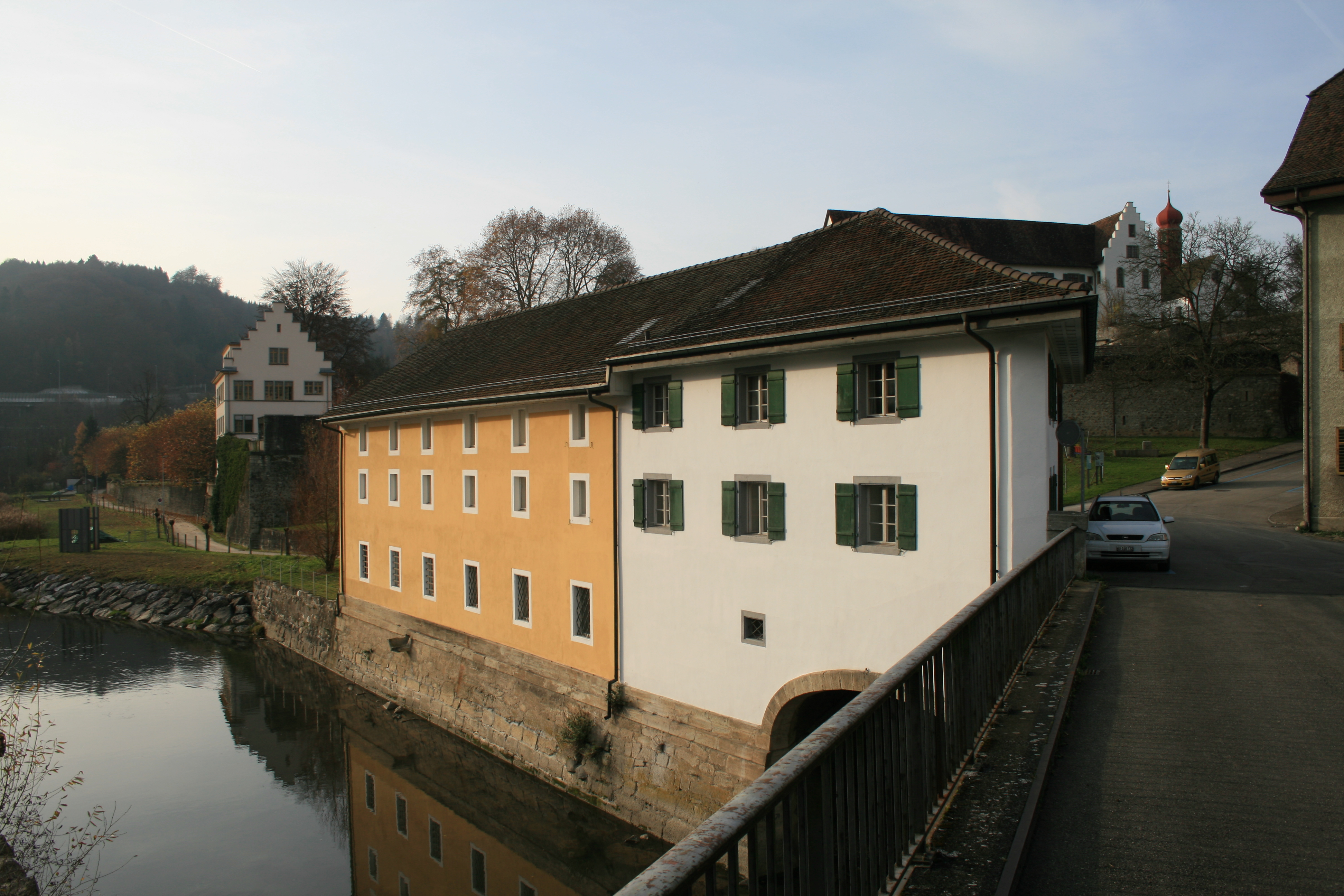 Zollhaus Kanzlerrain, Wettingen